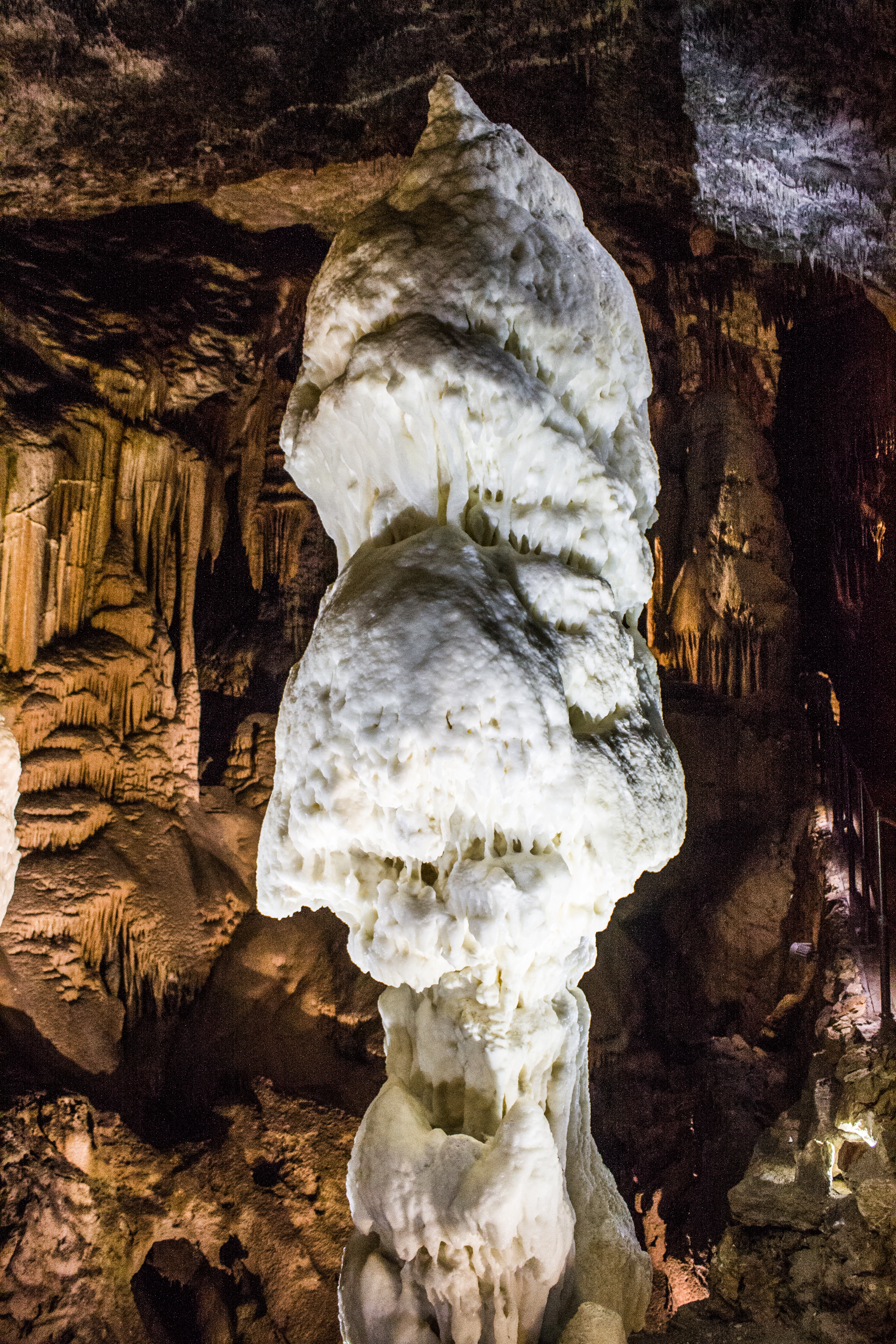 Postojna Cave